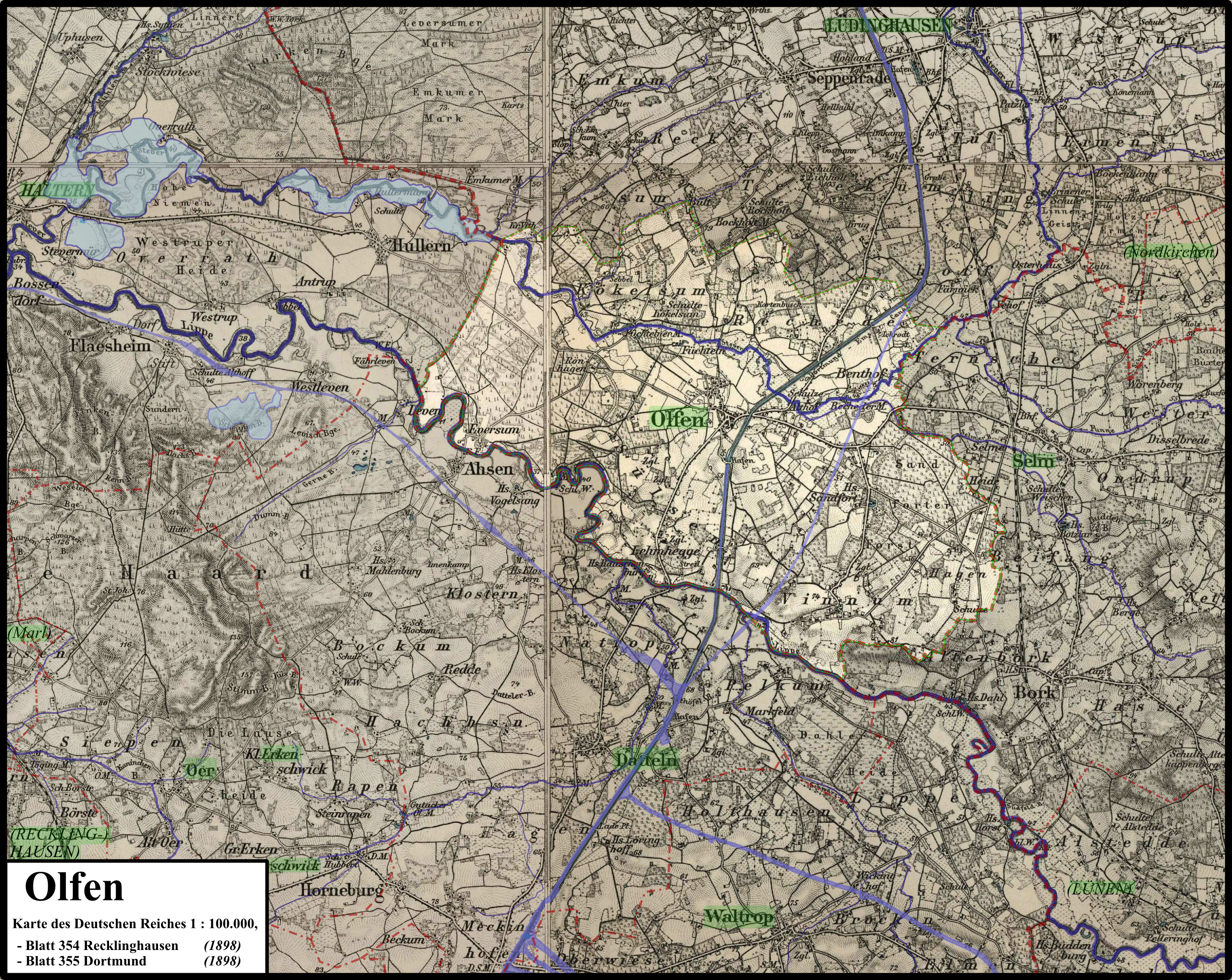 Karte der Stadt Olfen auf Basis der Karte des Deutschen Reiches| 1 : 100.000, Ende des 19. Jahrhunderts;Verwaltungsgrenzen (rot), Kanäle, Flüsse und Seen entsprechen dem heutigen Stand/Verlauf; heutige Stadtnamen sind hellgrün hervorgehoben (damalige Stadtnamen in Großbuchstaben), aufgehellt und hellgrün umgrenzt ist die heutige Stadt Olfen.